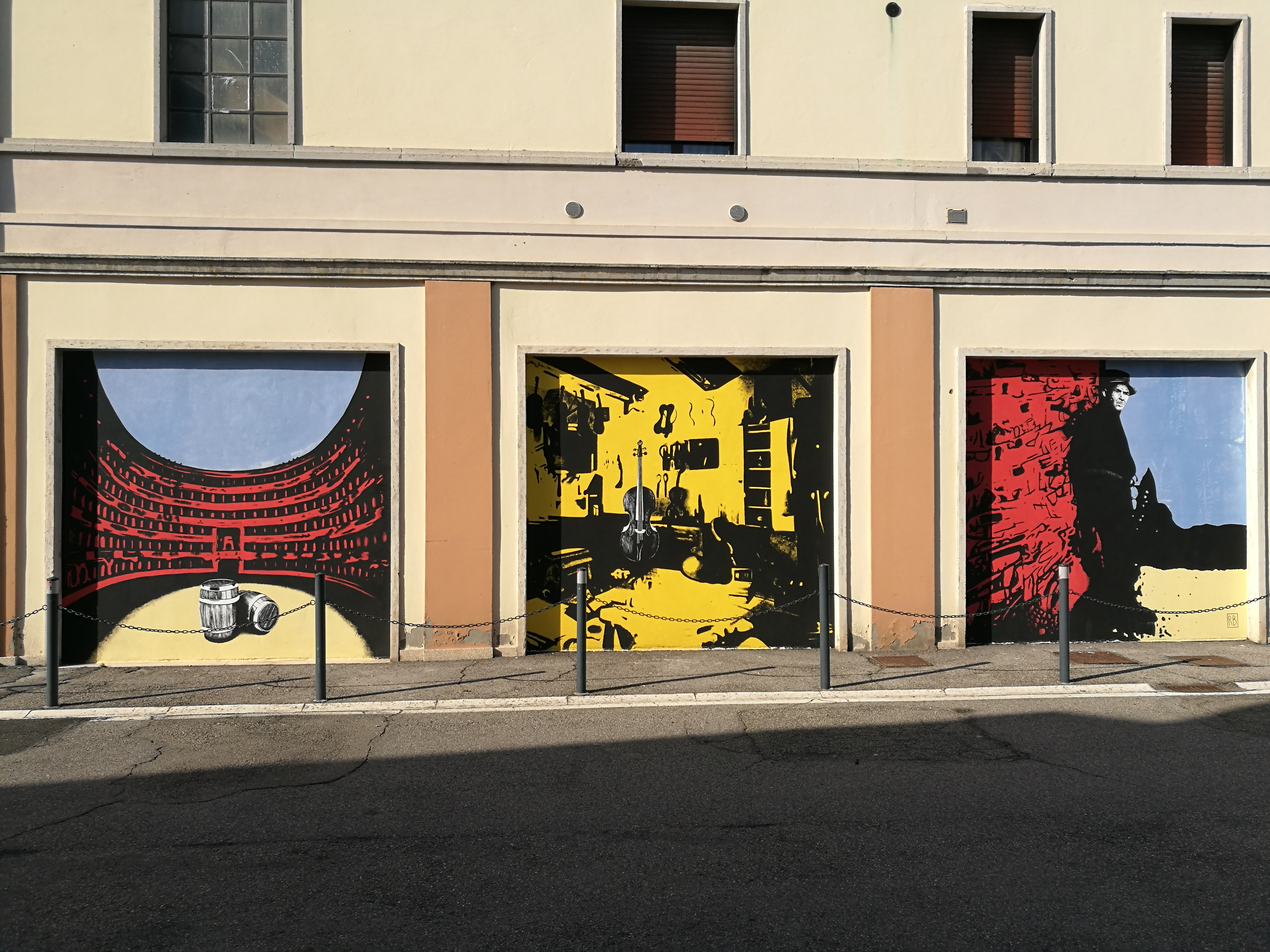 Dipinti di arte urbana dedicati al liutaio santagatese Custode Marcucci. Realizzati dall'artista Riccardo Buonafede. This is a photo of a monument which is part of cultural heritage of Italy.